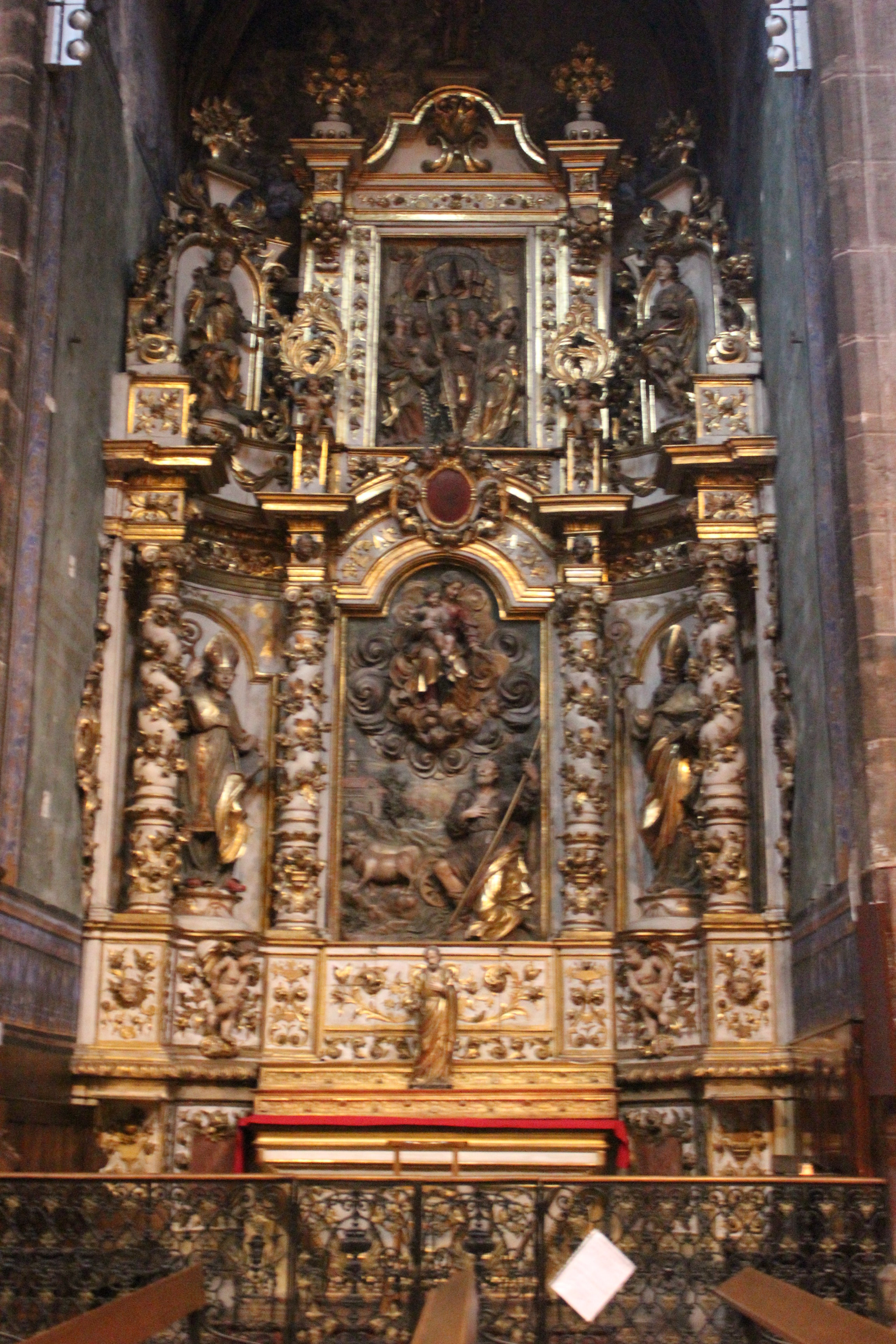 Prades (Pyrénées-Orientales, France), église Saint Pierre, retable de St Gaudérique.